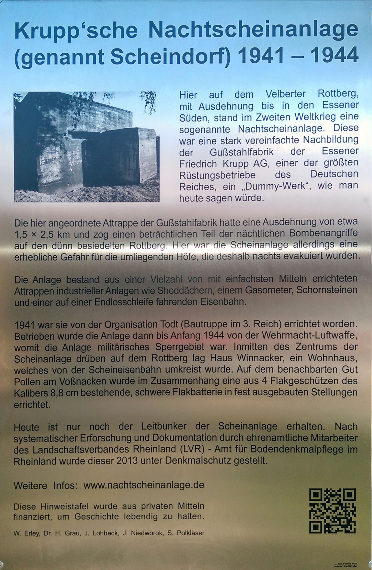 Am Neanderlandsteig wurde 2016 eine Historientafel mit Hinweis auf die Kruppsche Nachtscheinanlage aufgestellt.